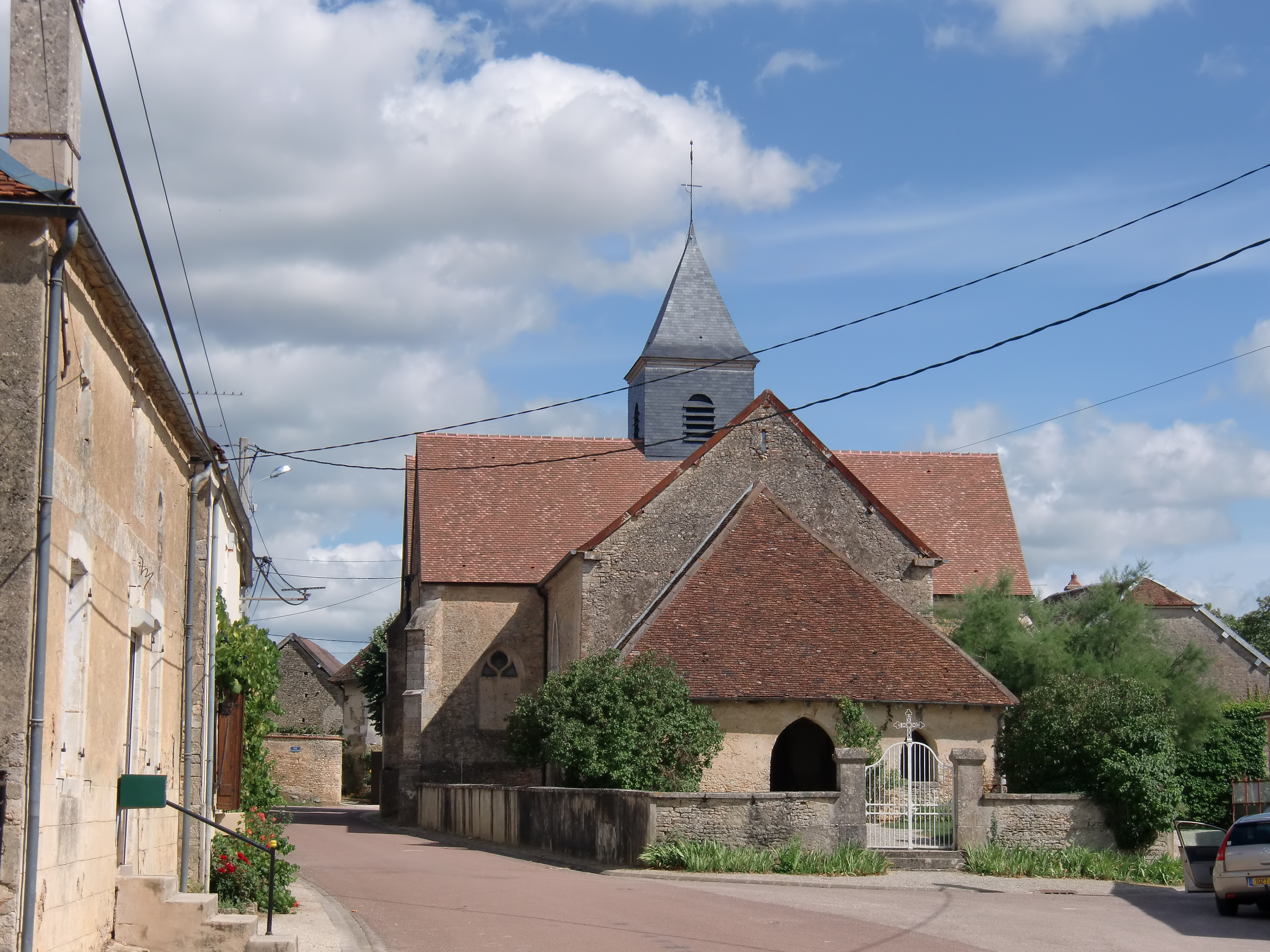 église de Thieffrain (Aube, France)